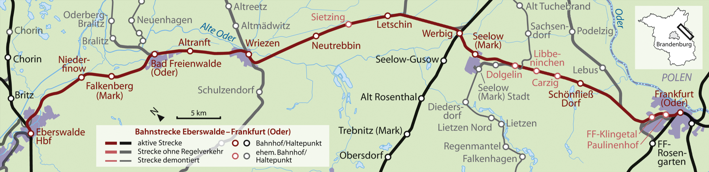 Karte der Bahnstrecke Eberswalde–Frankfurt (Oder)